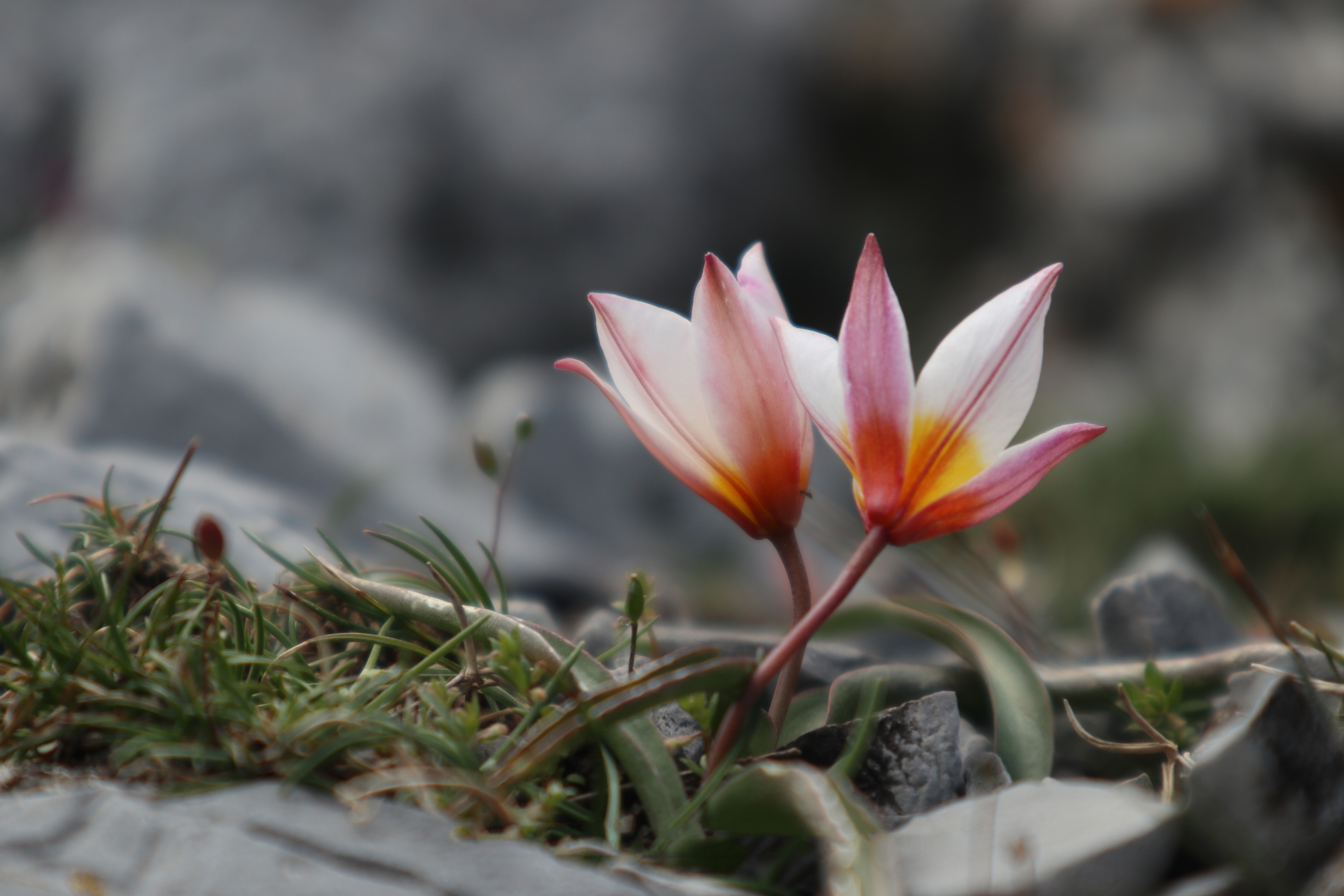 Η κρητική τουλίπα ενδξμικό είδος της Κρήτης This is a photography of Natura 2000 protected area with ID GR4320005